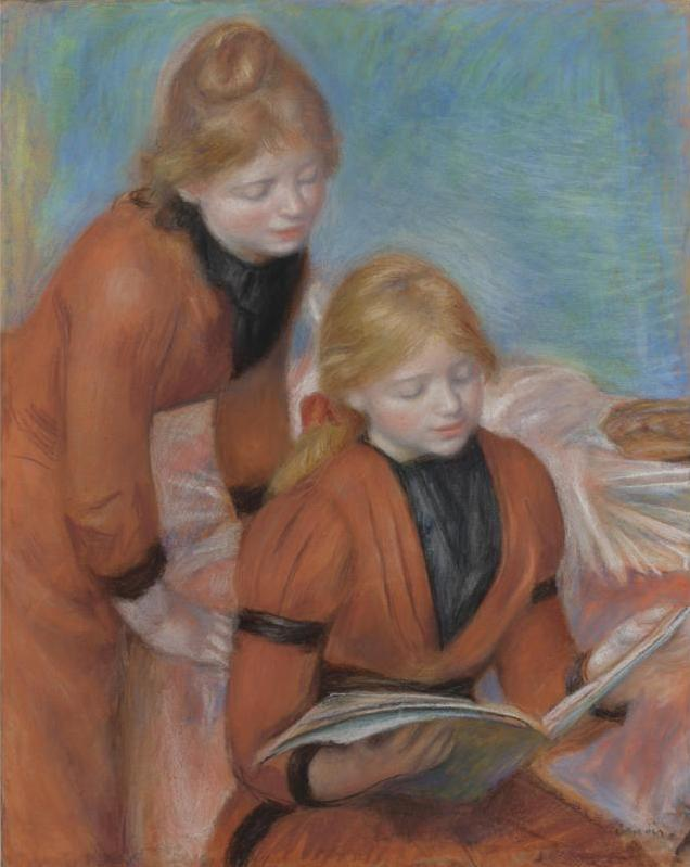 La Lecture